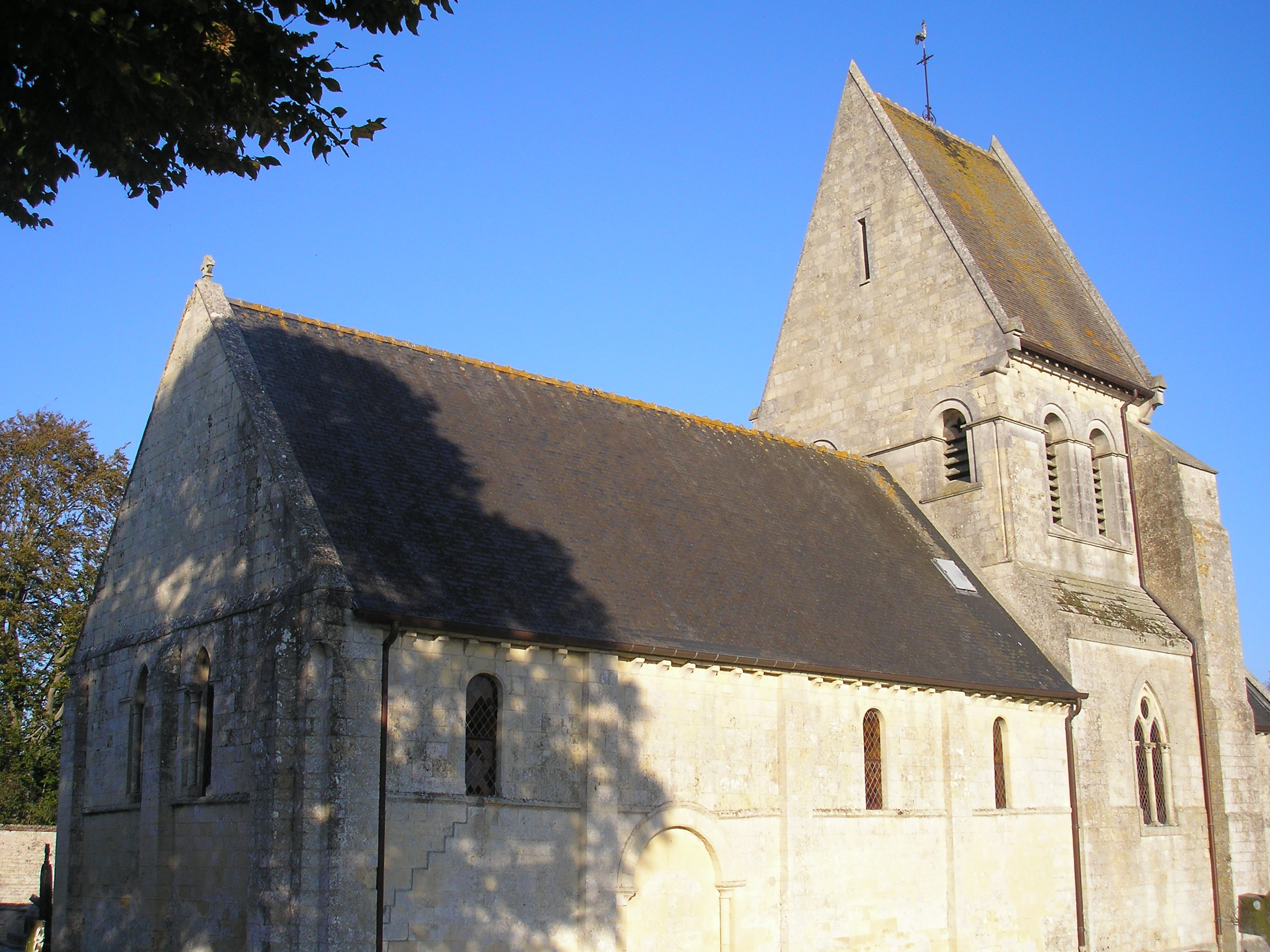 Putot-en-Bessin (Normandie, France). L'église Notre-Dame-de-la-Nativité.